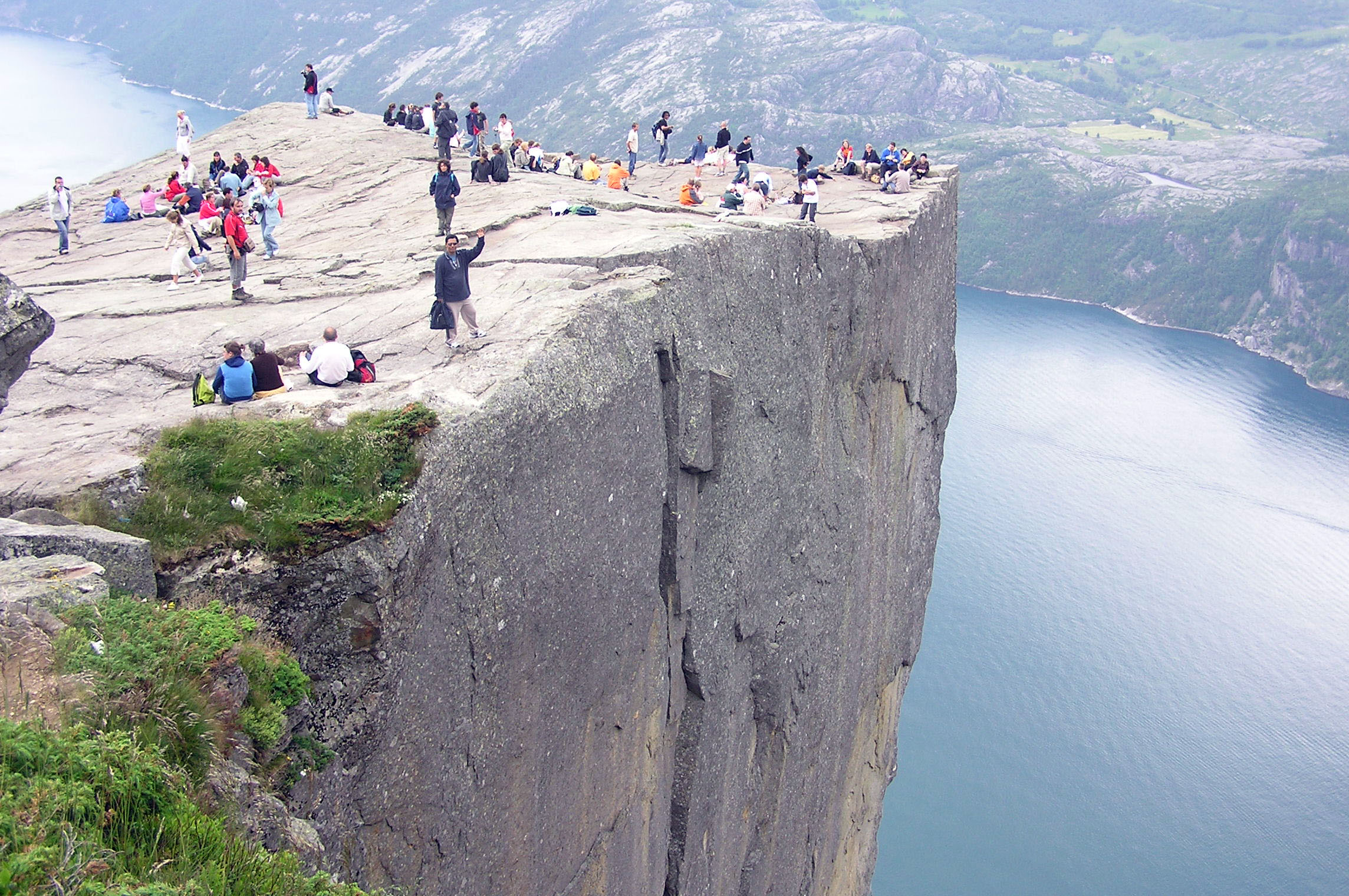 Vista del Preikestolen ("el púlpito"). Foto tomada el 7 - julio - 2006.